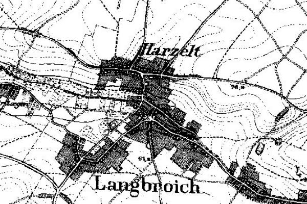 Neuaufnahme 1891-1912